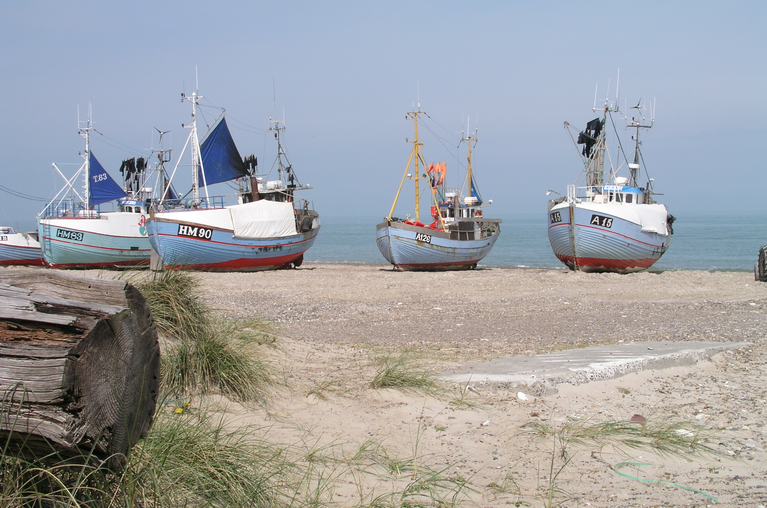 Fiskekuttere på Torup Strand HM83 - VESTFJORD HM90 - E.M. OLSEN A15 A126 - HEBRON